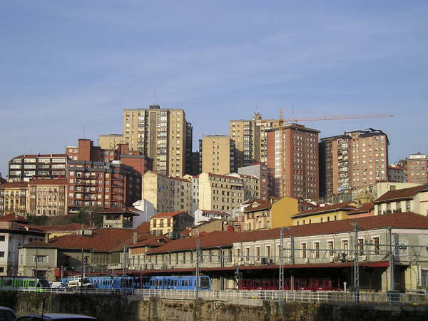 Santutxuko auzoa Atxuritik ikusia.